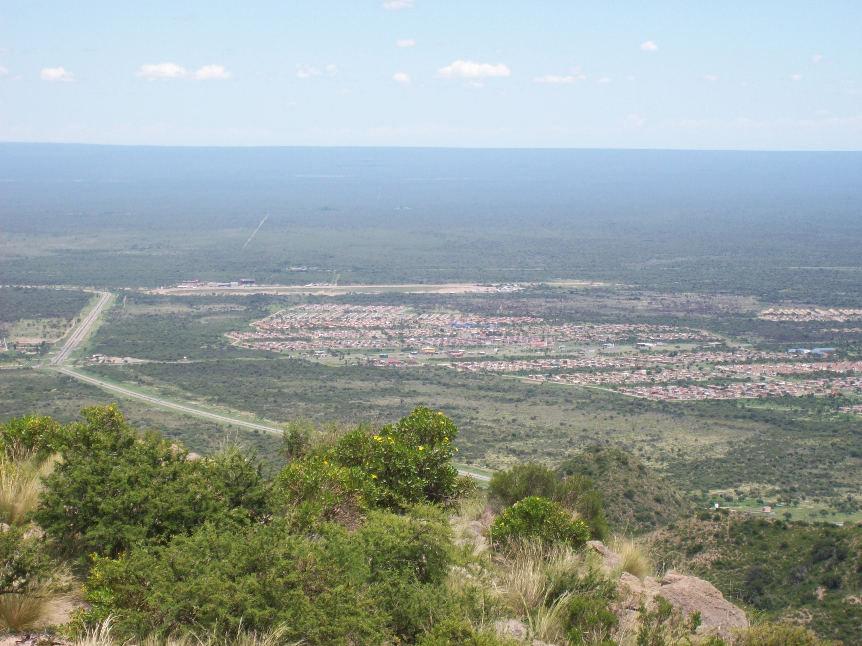 Ciudad de La Punta vista desde el Circuito Serrano en la Provincia de San Luis, Argentina.